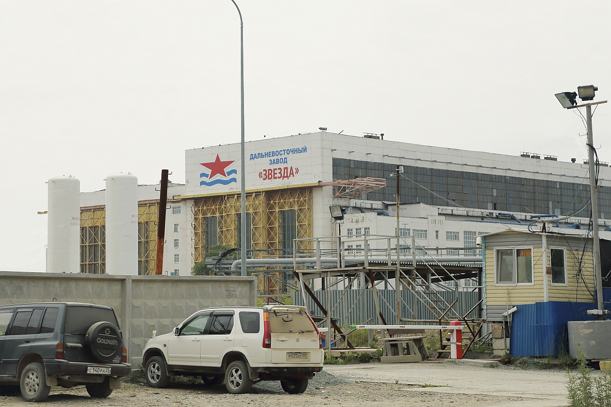 Цеха Дальневосточного судостроительного завода "Звезда" 2015.06.27